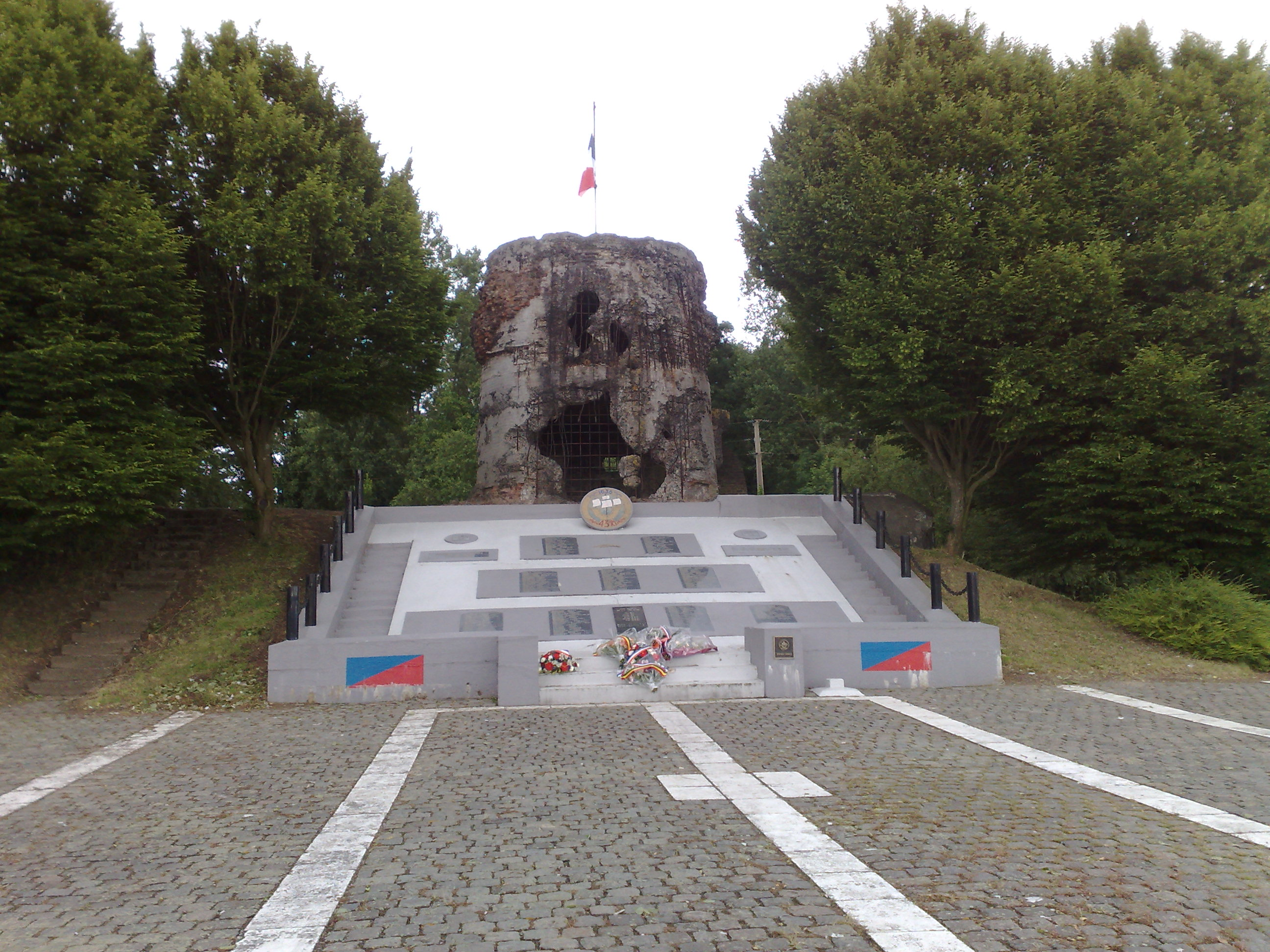 Le Moulin de Bruille Saint Amand après la prise d'armes du 27 mai 2009